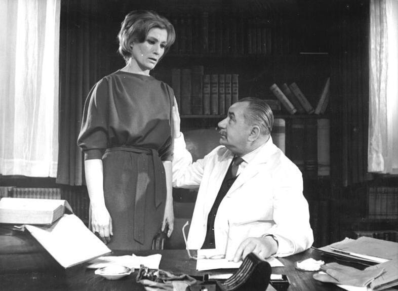 Zentralbild-Hochneder Nl-Noa 23.4.1960 Premiere des Schauspiels "Weißes Blut" in den Berliner Kammerspielen. Am 26.4.1960 findet in den Kammerspielen des Deutschen Theaters in Berlin die Premiere des Schauspiels "Weißes Blut" von Harald Hauser statt. Die Inszenierung besorgte Wolfgang Heinz. UBz: Eine Szene aus dem Schauspiel. Eleonore von der Lohe (Inge Keller) und Dr. Bertram Soltau (Paul R. Henker).